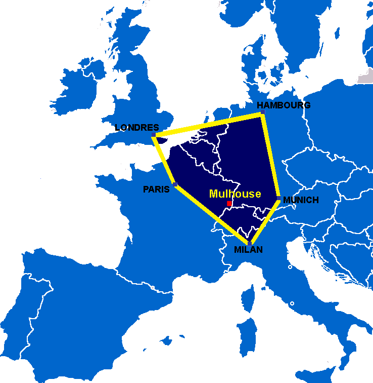 Mulhouse dans le pentagone